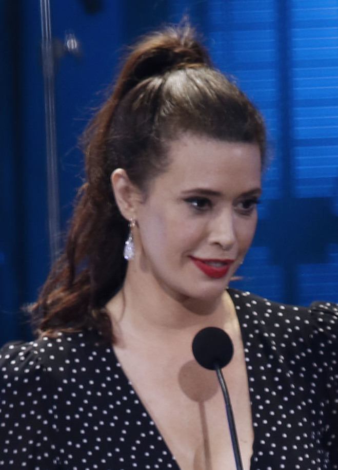 Miércoles 6 de diciembre de 2017En el Teatro de la Ciudad Esperanza Iris, se realizó la 4ª Entrega del Premio Iberoamericano de Cine, Fenix.